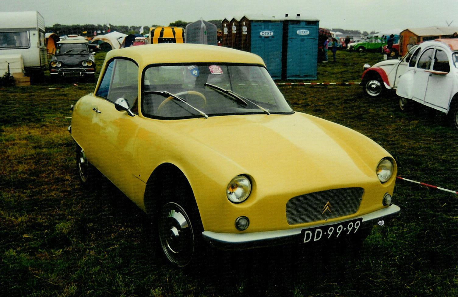 Véhicule dérivés de la 2cv. Reprenant principalement la plateforme et la mécanique. Les plaques d'immatriculation ont volontairement été masquées.